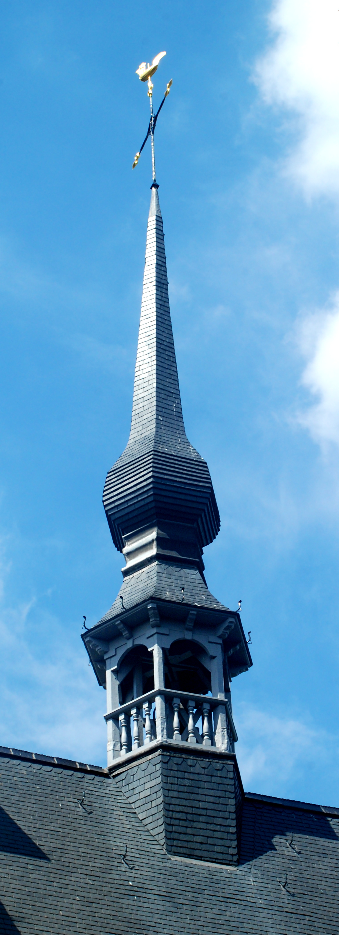 Belgique - Brabant flamand - Louvain (Leuven) - Chapelle des Sœurs Noires (Zwartzusterskapel)